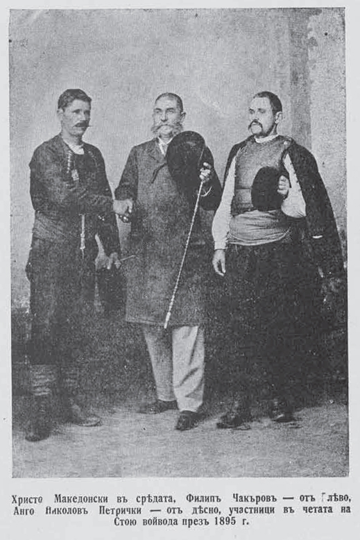 Hristo Makedonski, Filip Chakarov and Ango Petrichki from SMAC